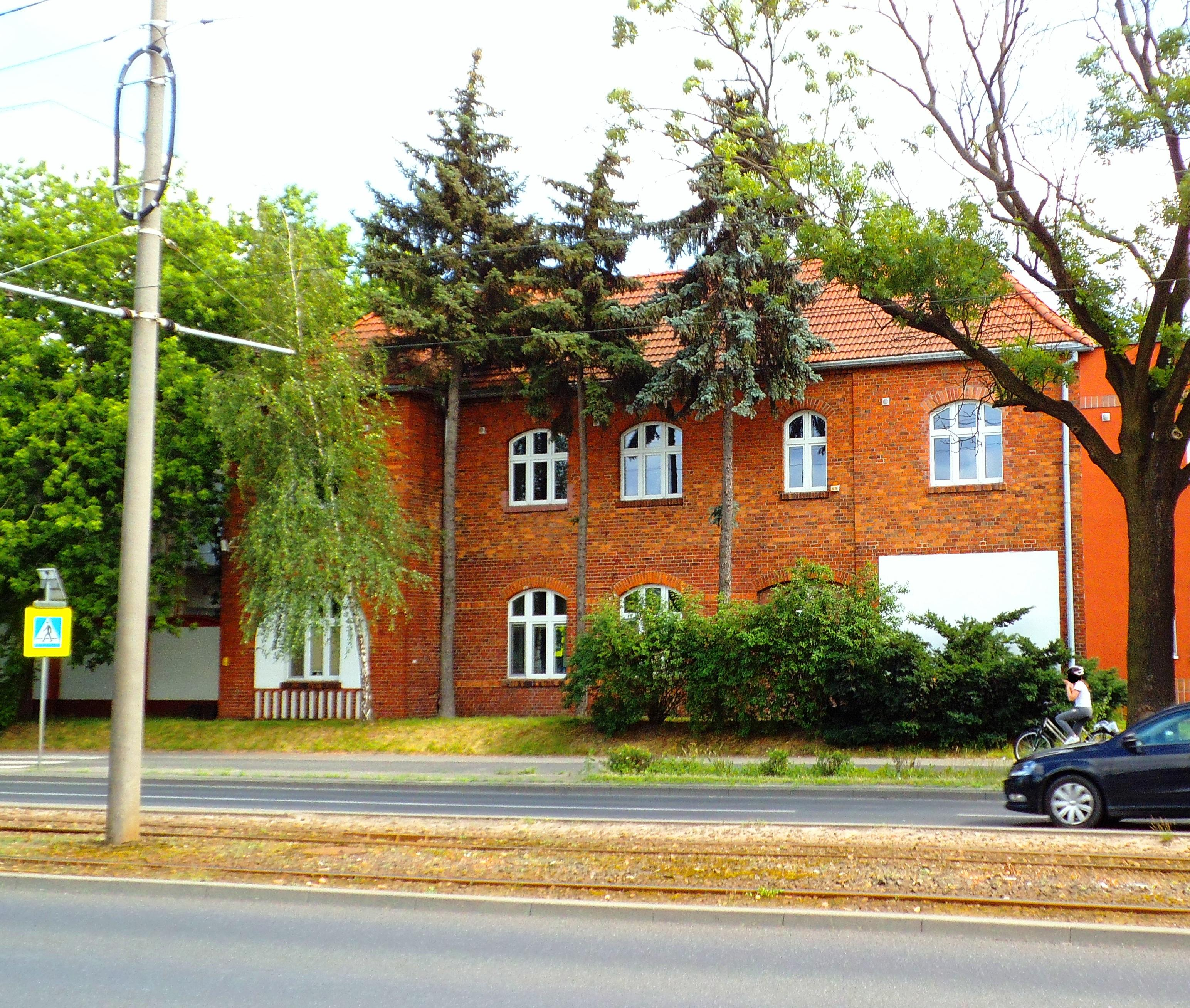 Cereal Partners Poland Toruń Pacific